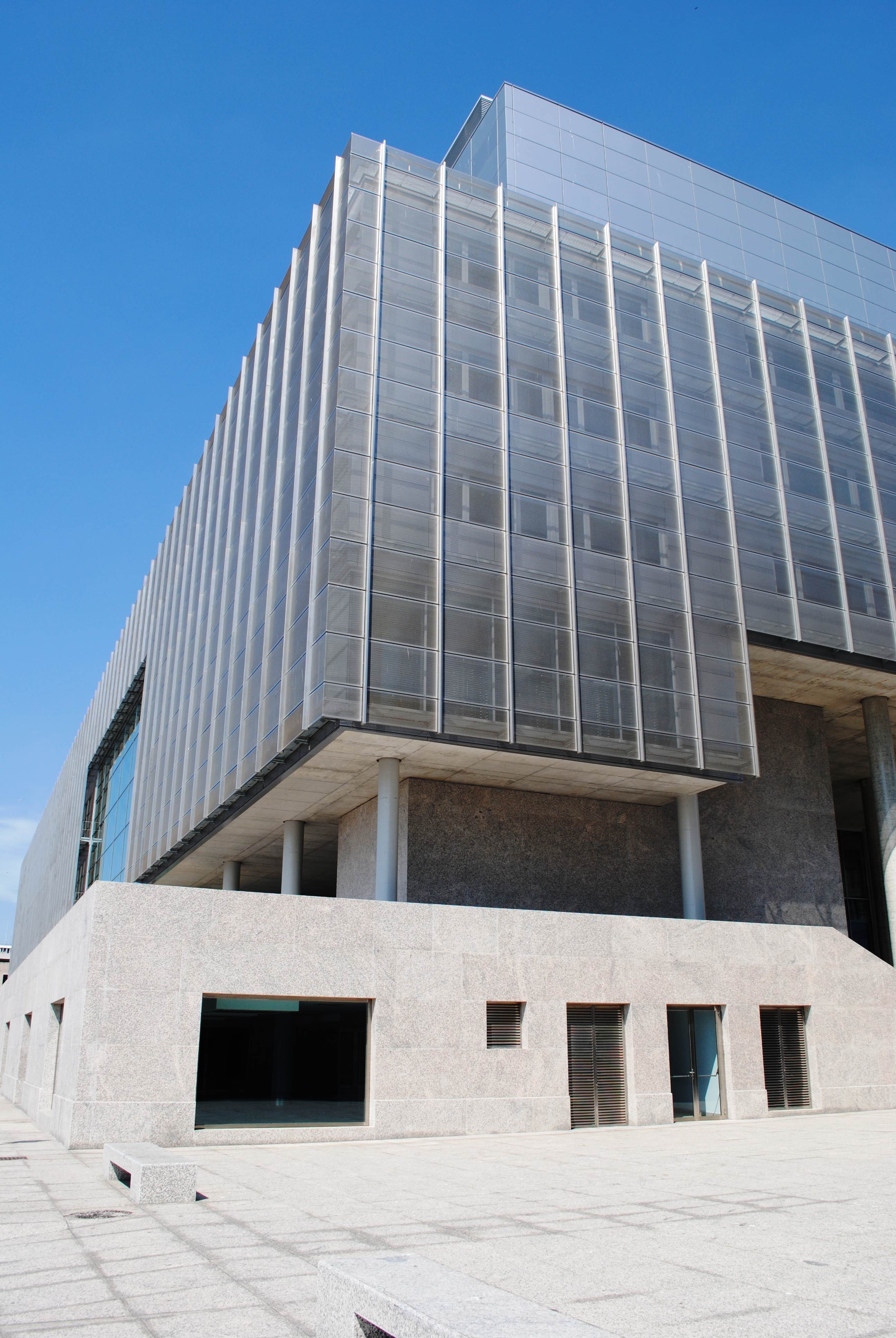 Auditorio Pazo de Congresos Mar de Vigo, 2011, Vigo.